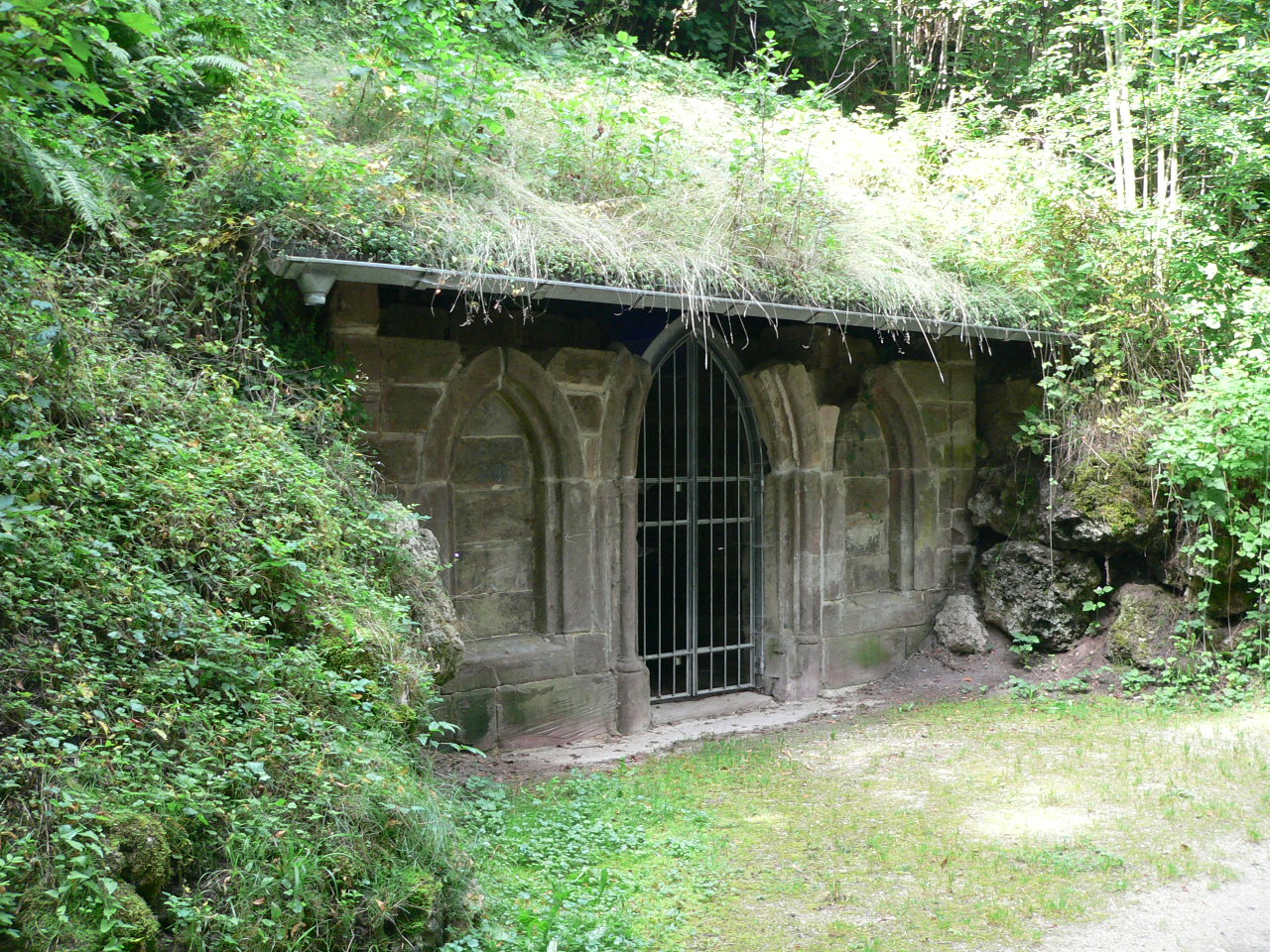 Eremitage im Schlosspark Rosenau bai Coburg